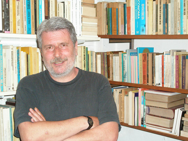 Daniel Barret/Rafael Spósito, anarquista uruguayo.